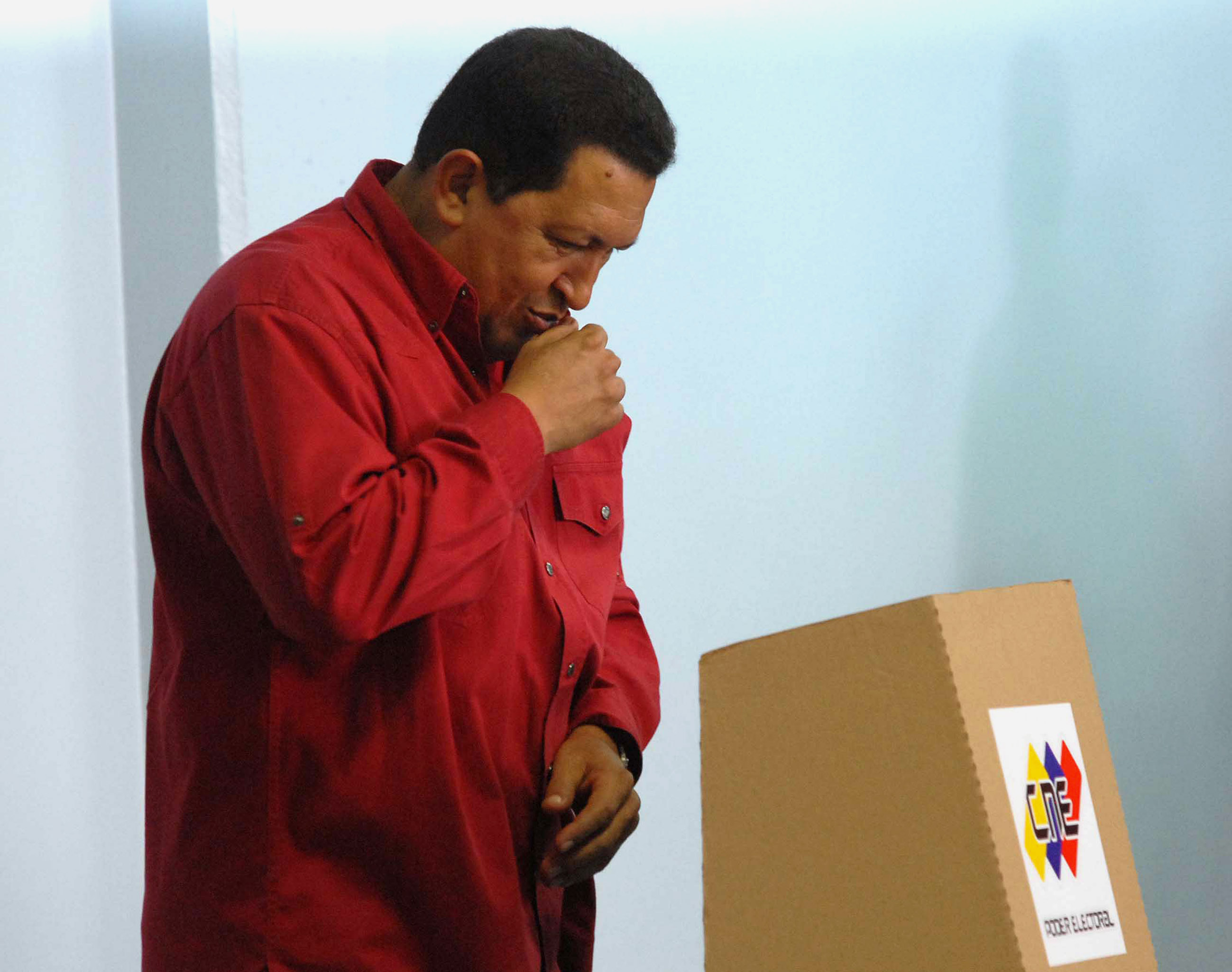 Hugo Chávez hablando sobre la propuesta de la Reforma Venezolana 2007, 2 de diciembre.